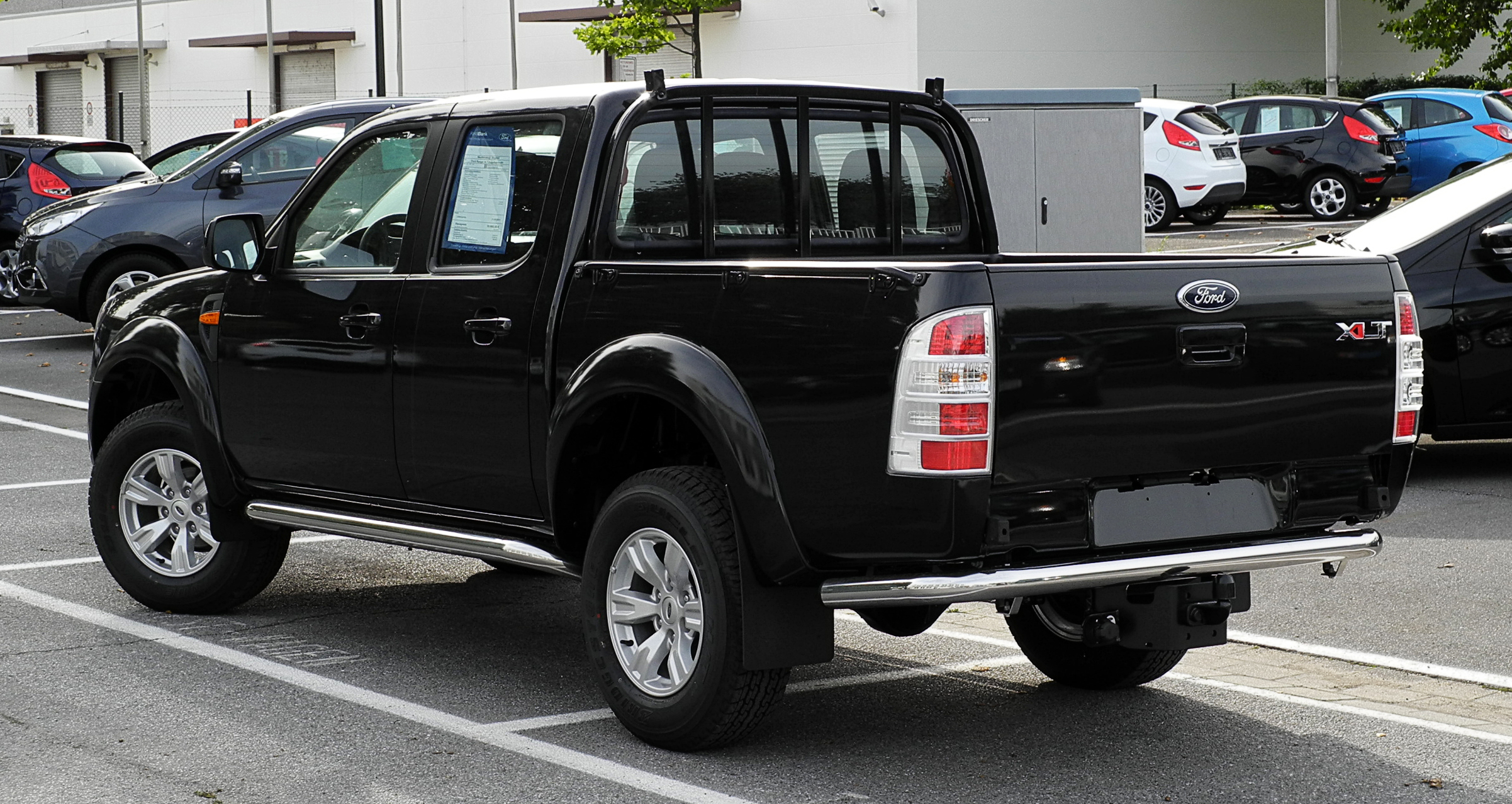 Ford Ranger XLT 2.5 TDCi Doppelkabine (II, Facelift)